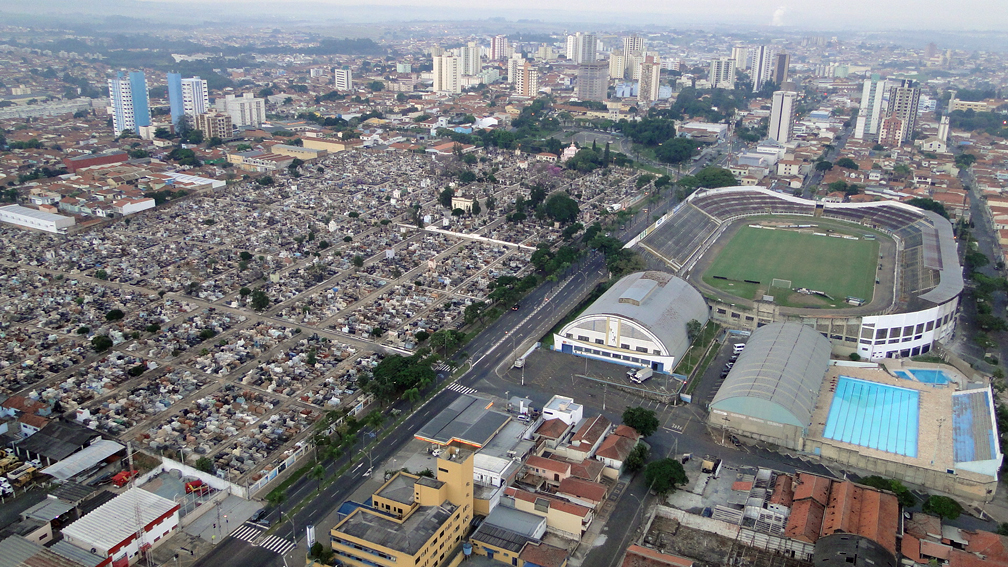 Fotografia aérea do Estádio do XV de Piracicaba, em Piracicaba, São Paulo, Brasil.